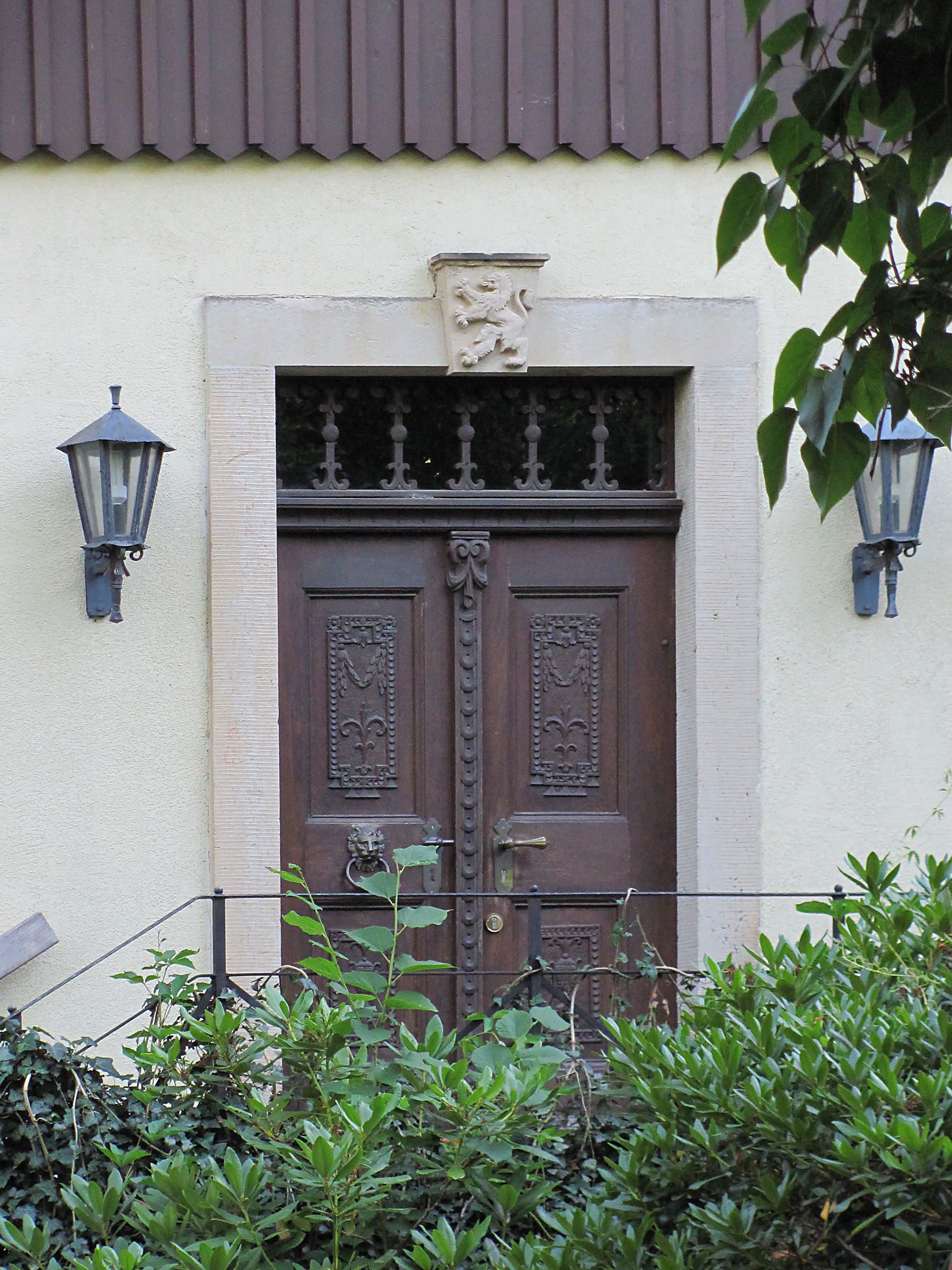 Radebeul, Haus Barnewitz, Tür